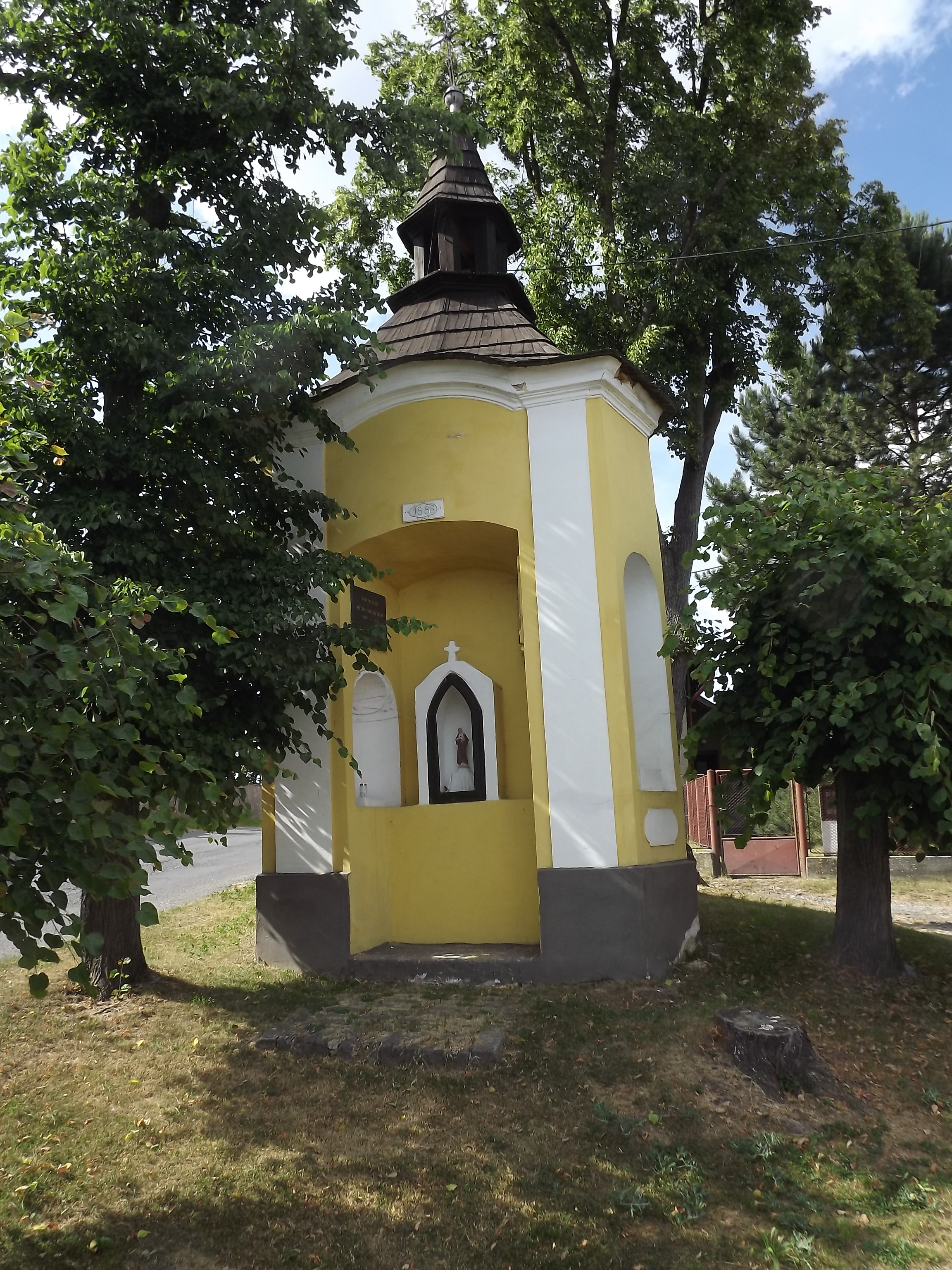 Kaplička Panny Marie, Občov, okres Příbram, náves.